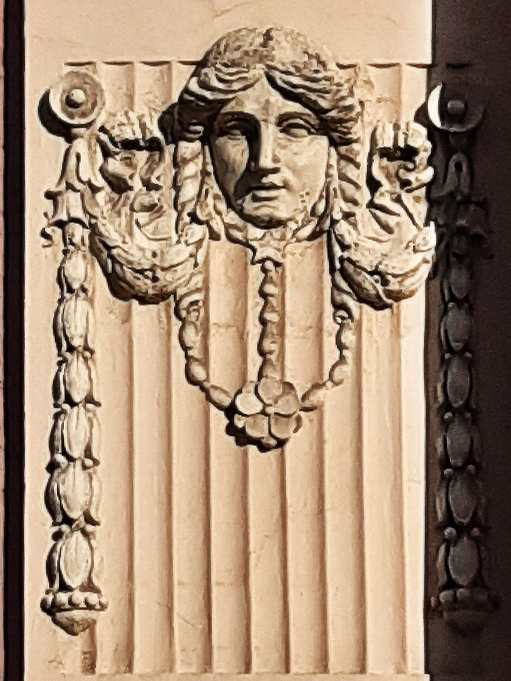 Маскарон. Прибутковий будинок, Київ, вулиця Рейтарська, 20/24